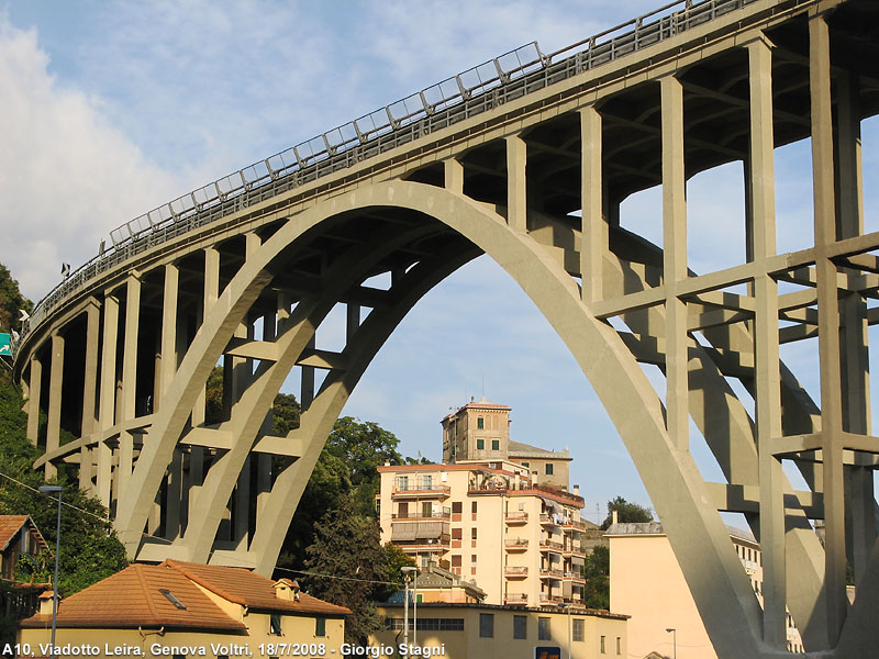 Genova Voltri, il viadotto Leira sulla carreggiata sud dell'autostrada A10.